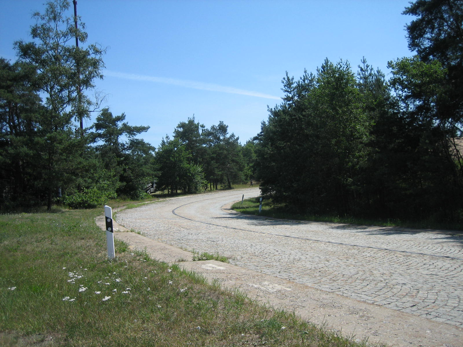 Nordost-Quadrant des Autobahnkreuzes Nürnberg mit originalem Pflaster